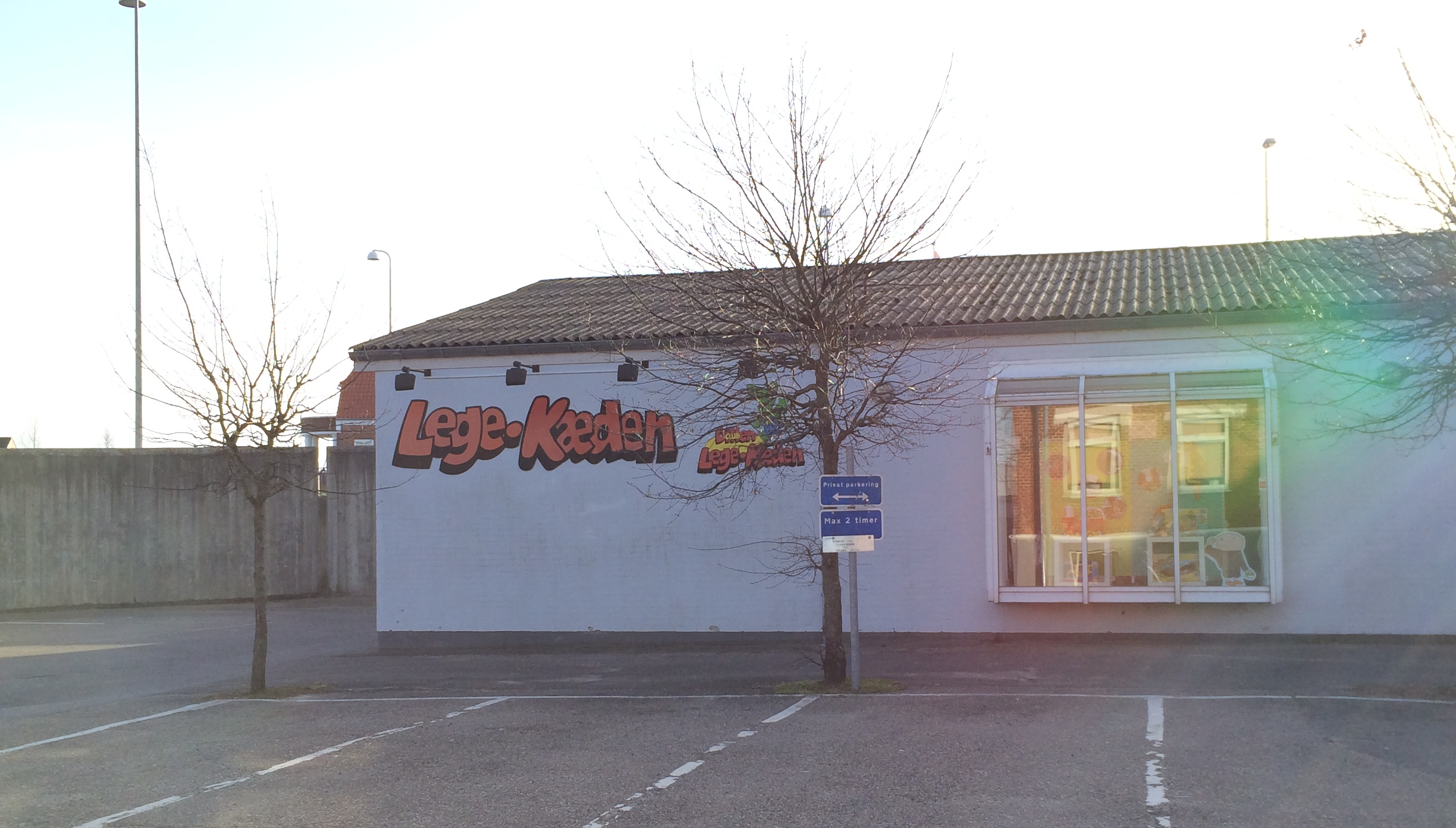 Legekæden i Hadsund